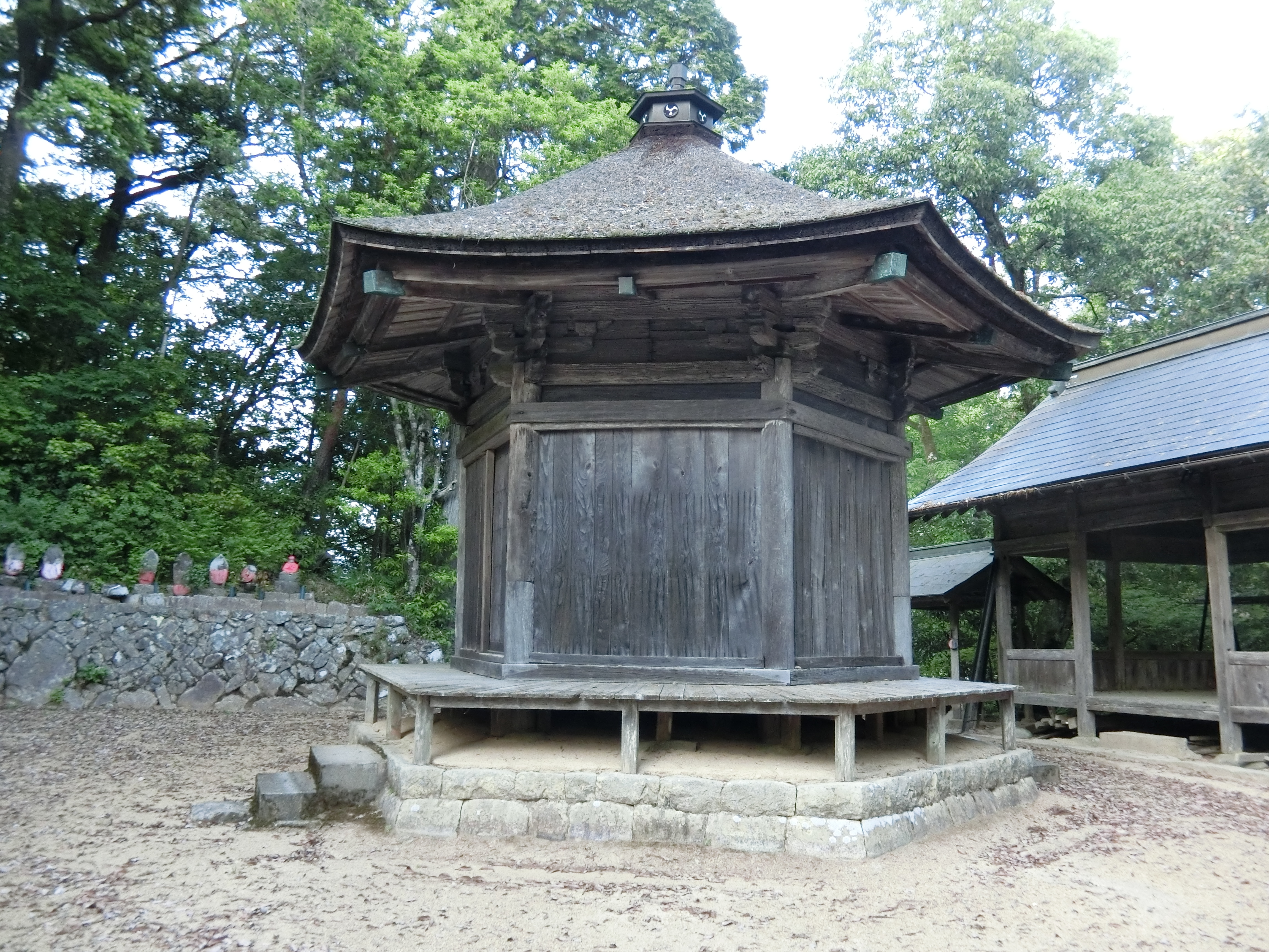 岐阜県美濃市立花にある鹿苑寺の地蔵堂(通称、六角堂)。国指定重要文化財。